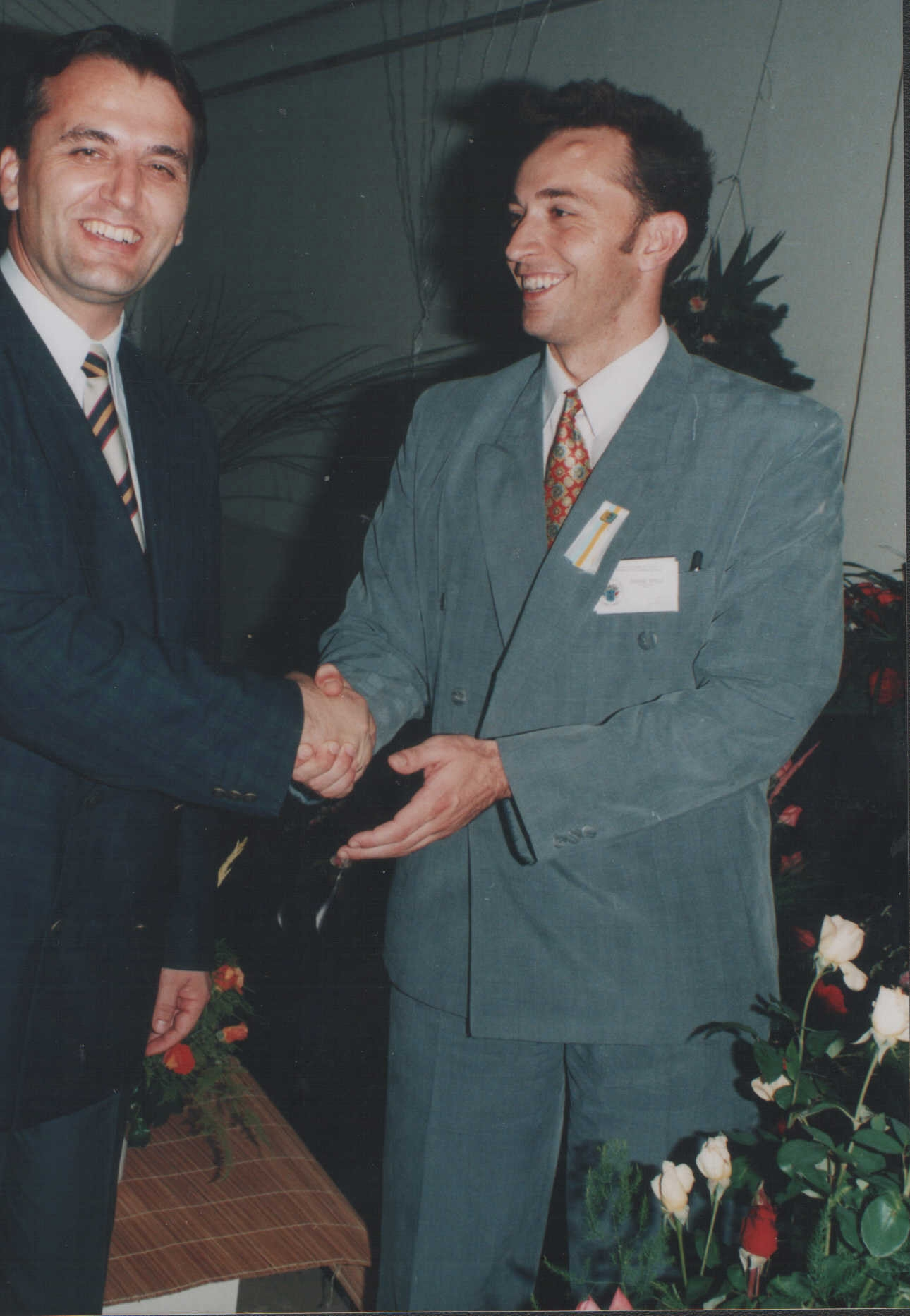 Bosko Perosević (1956-2000), predsednik Izvršnog veća Vojvodine, sa Atilom Juhasom, gradonačelnikom Sente, 10. septembra 1997, otvara Izložbu ruža, povodom 300 godina Bitke kod Sente. foto: Stevan Kragujević (po odobrenju kćerke Tanje Kragujević)